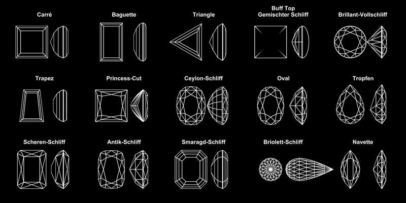 Edelsteinschliffe